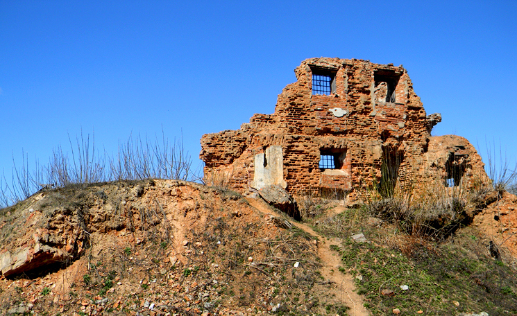 Барысаўскі замак